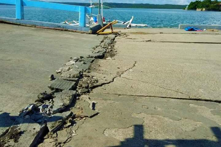 Tagalog: INCIDENT REPORT: Nagbitak-bitak ang ilang bahagi ng Cataingan Port matapos ang 6.5 magnitude na lindol sa Cataingan, Masbate kaninang umaga, ika-18 ng Agosto 2020. Sa kabila nito, ligtas ang lahat ng port personnel, tripulante, at mga mangingisda na nasa pantalan noong maganap ang insidente. Walang ring naitalang aksidente sa karagatan kasabay ng lindol. Ayon sa Coast Guard Station – Masbate, pansamantalang itinigil ang operasyon ng Cataingan Port habang nagpapatuloy ang safety assessment sa mga kritikal na bahagi ng pantalan. Muli namang binuksan ang Cataingan Port para sa biyahe ng mga sasakyang pandagat kaninang alas dose ng tanghali. Samantala, naramdaman rin ang malakas na pagyanig sa Coast Guard Regional Training Center sa Masbate kung saan nagsasanay ang 476 na female trainee ng PCG. Sa kabila nito, walang naitalang ‘casualty’ sa naganap na insidente. Pagkatapos ng lindol, agad na bumuo ng Deployable Response Group (DRG) ang Coast Guard Station – Masbate para mapabilis ang pagresponde sa Cataingan Port at mga kalapit na lugar. [Photos Courtesy of Coast Guard Station – Masbate] DOTrPH🇵🇭 CoastGuardPH MaritimeSectorWorks